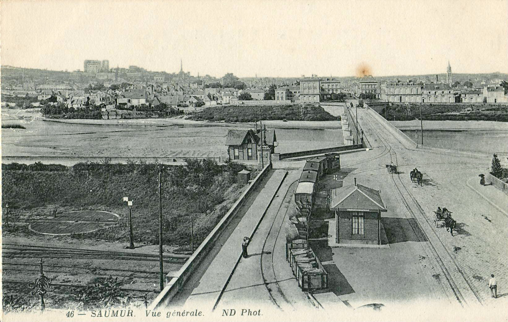 Carte postale ancienne éditée par ND, n°46 :Saumur - Vue générale.Vue au premier plan de la gare "Saumur Rive Droite" du tramway de Saumur, au dessus des voies du "grand réseau".